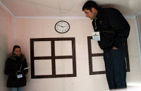 Ејмсова соба